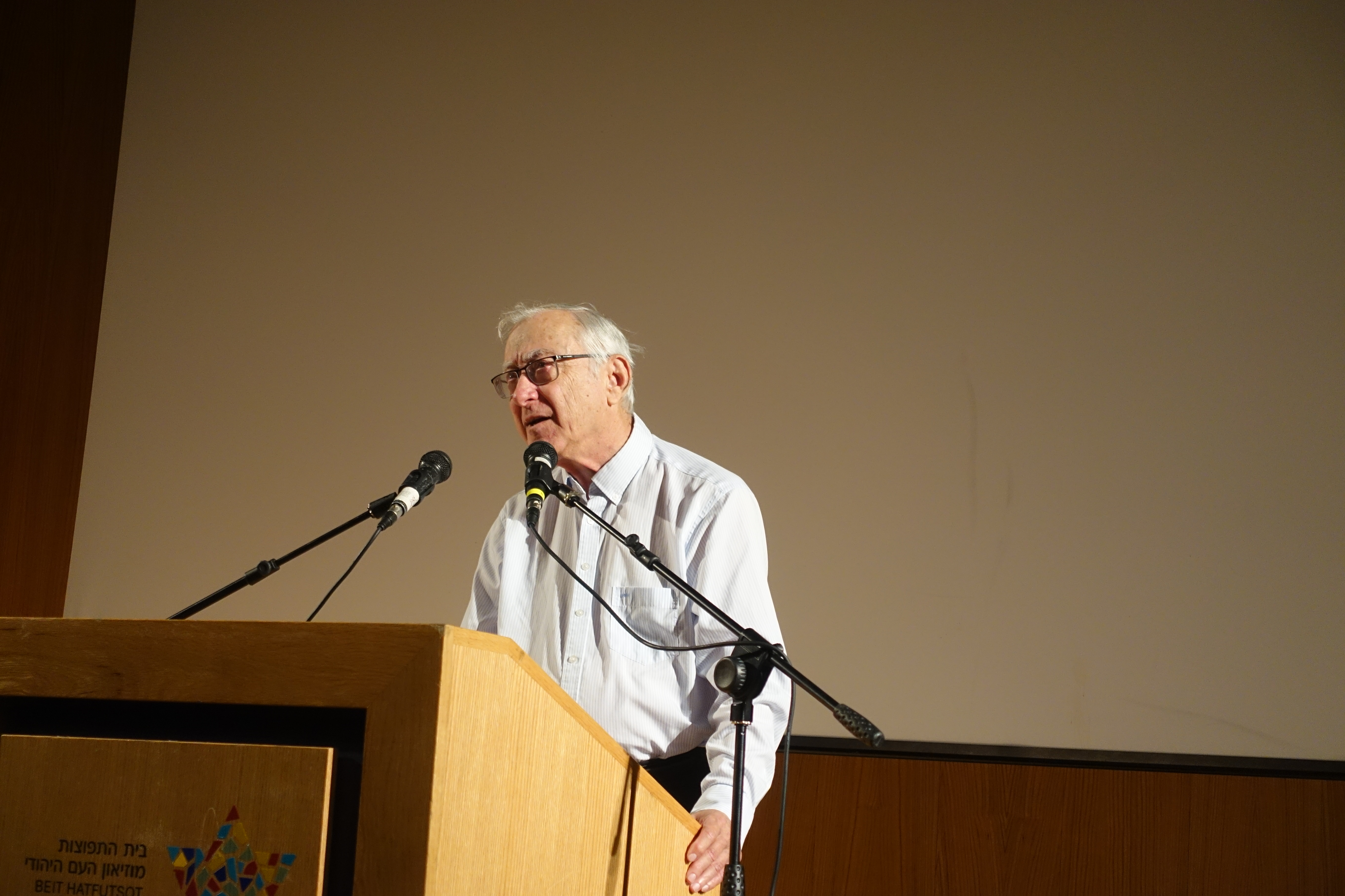 אסא כשר בהשקת ספרו של אוריאל לין לידתה של מהפכה, 2017, בית התפוצות